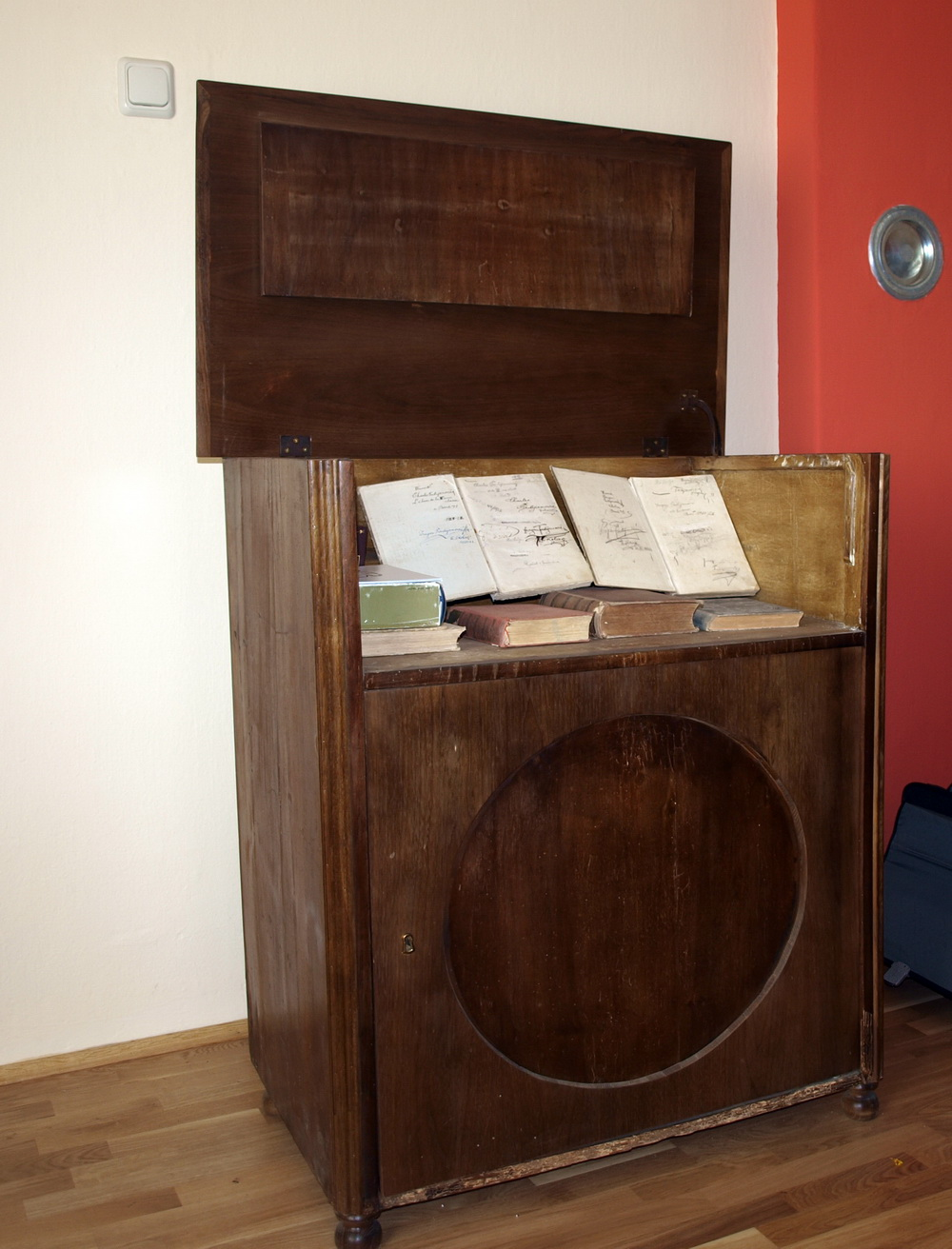 Radni stol Dragutina Tadijanovića u njegovom rodnom domu u selu Rastušje, Brodsko-posavska županija.